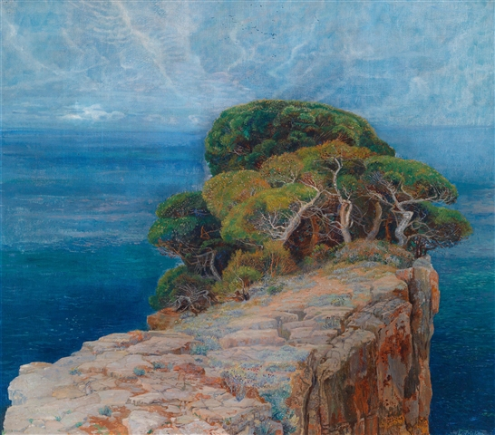 Blick auf Lacroma.